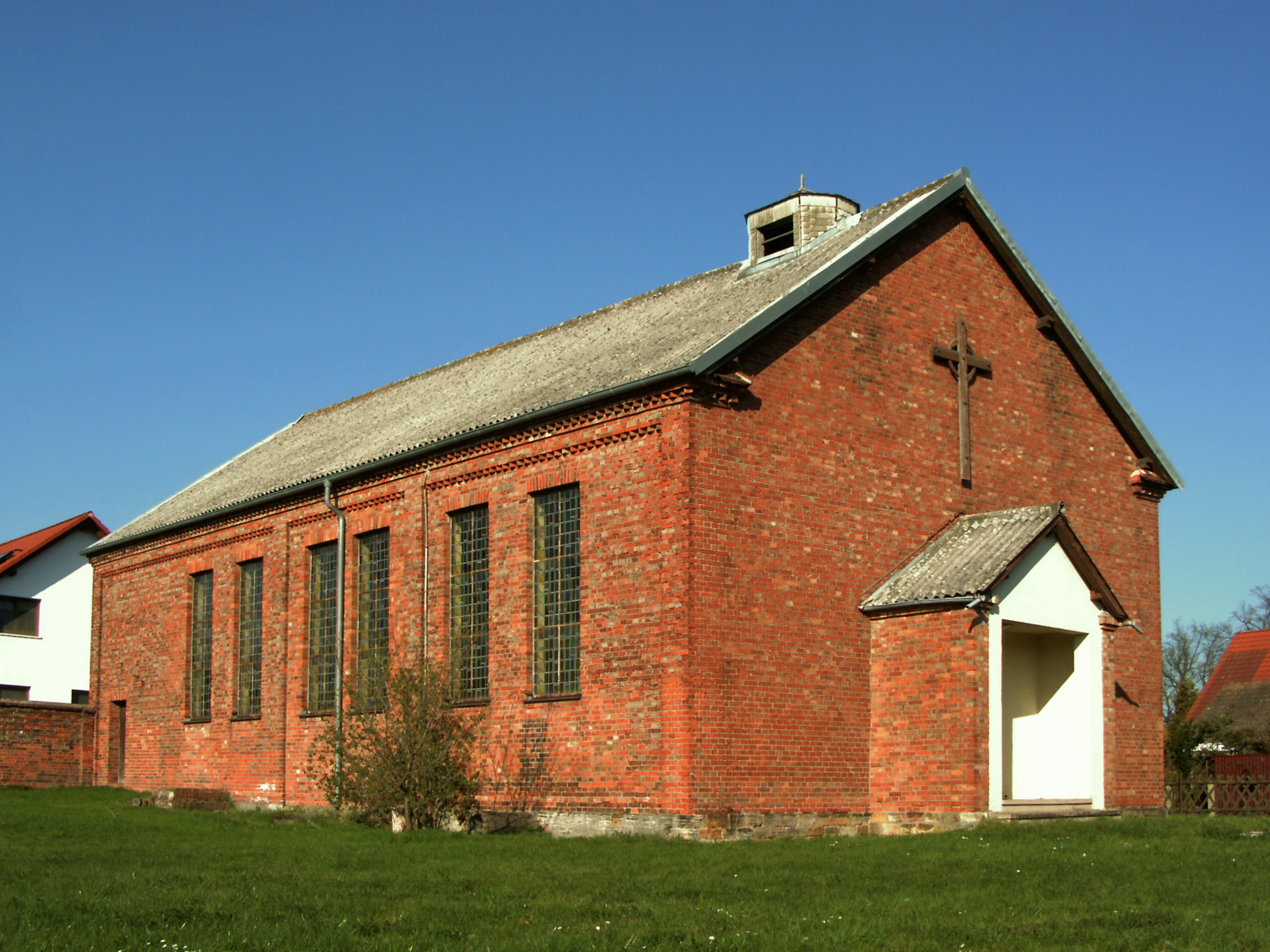 Katholische Kirche Heiliges Kreuz in Hornhausen, Ortsteil von Oschersleben (Bode)